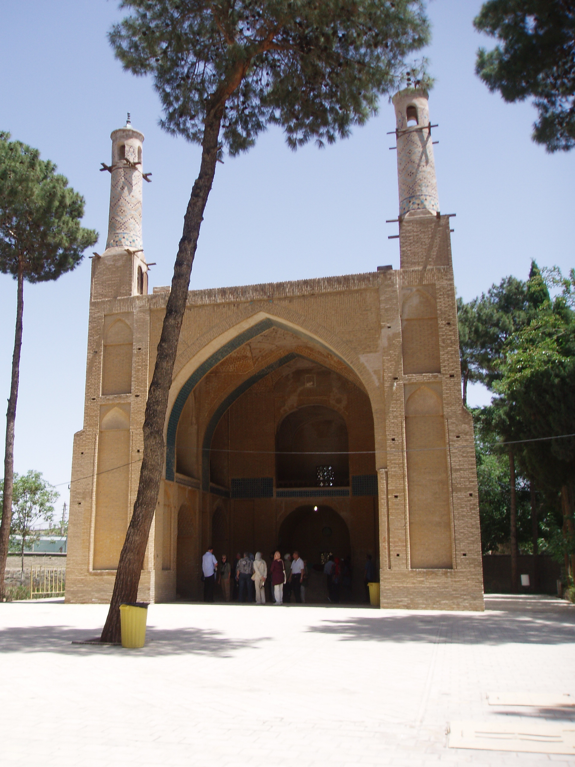 Shaking Minarets